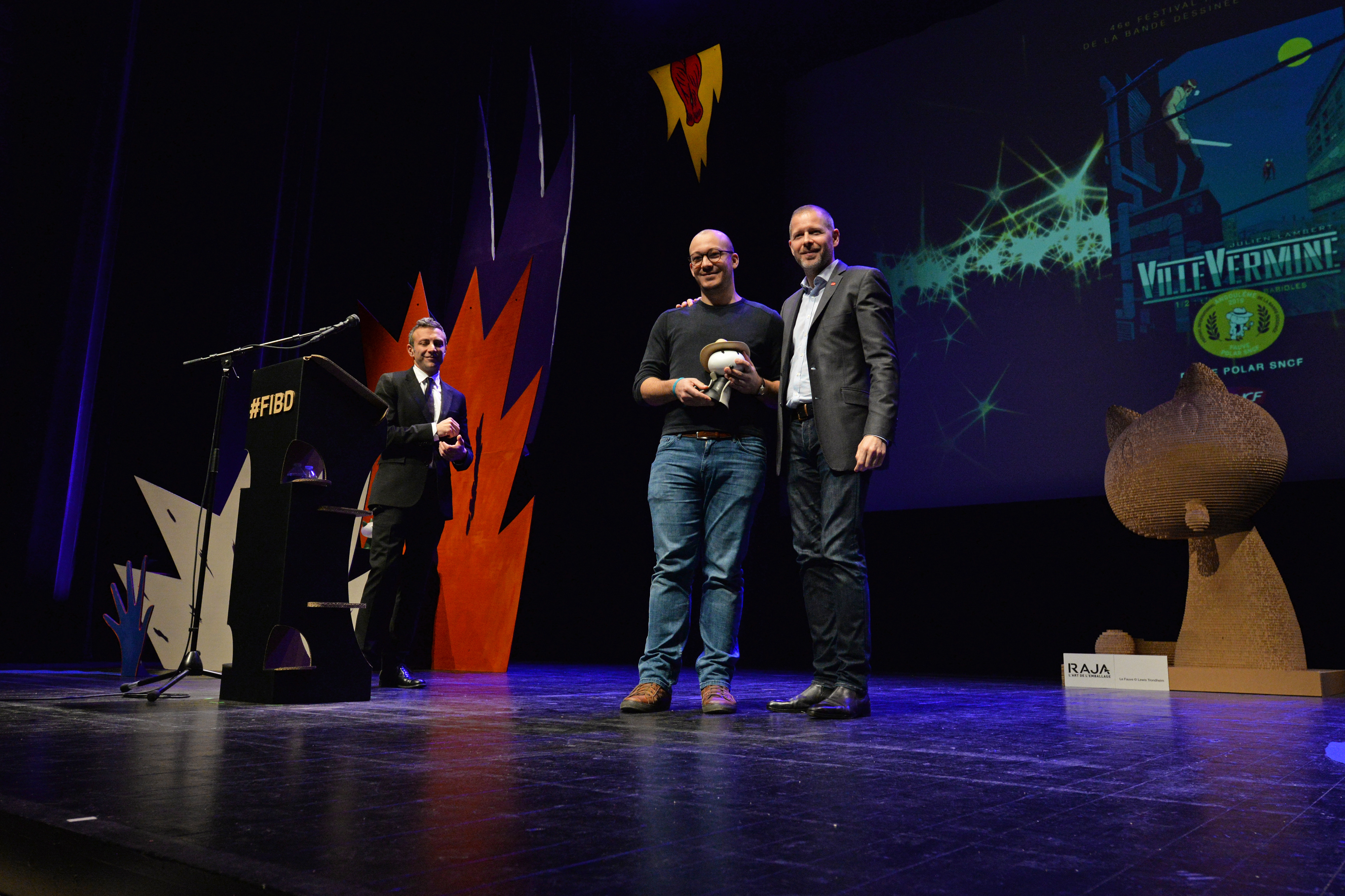 Cérémonie de remise des prix du Festival International de la Bande Dessinée d'Angoulême 2019.